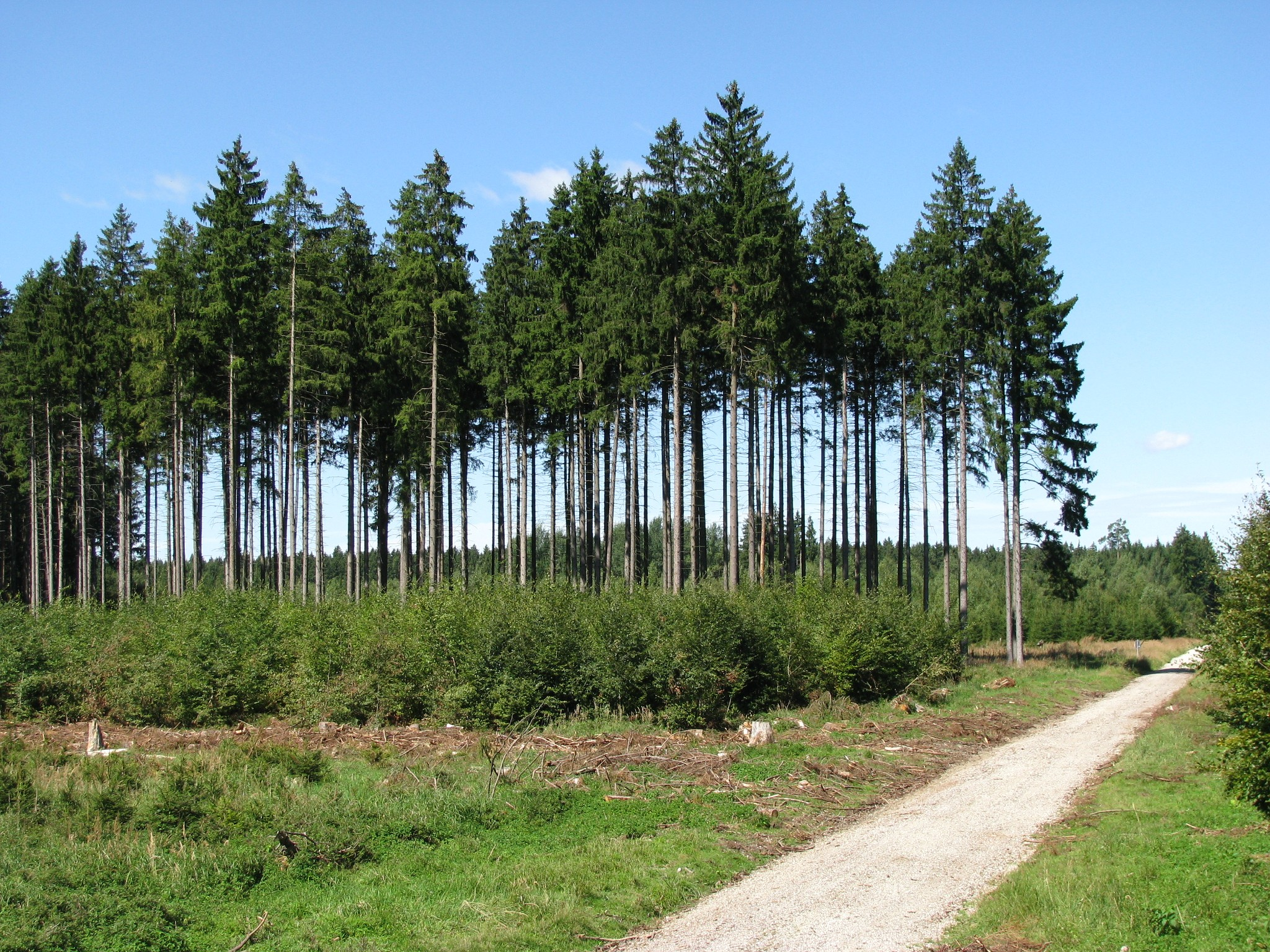 Fichtenreihe am Preysinggeräumt im Forstenrieder Park